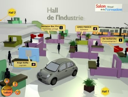 Salon virtuel